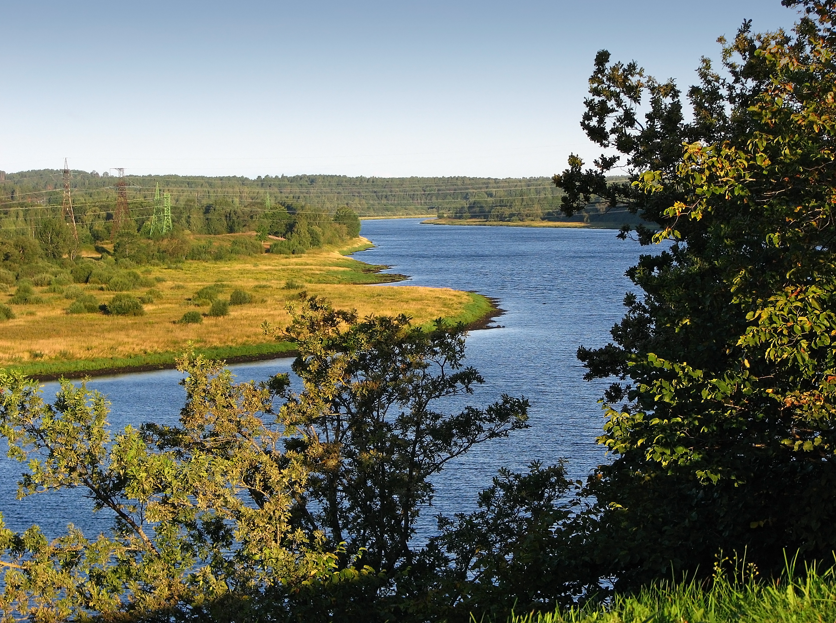 Даугава